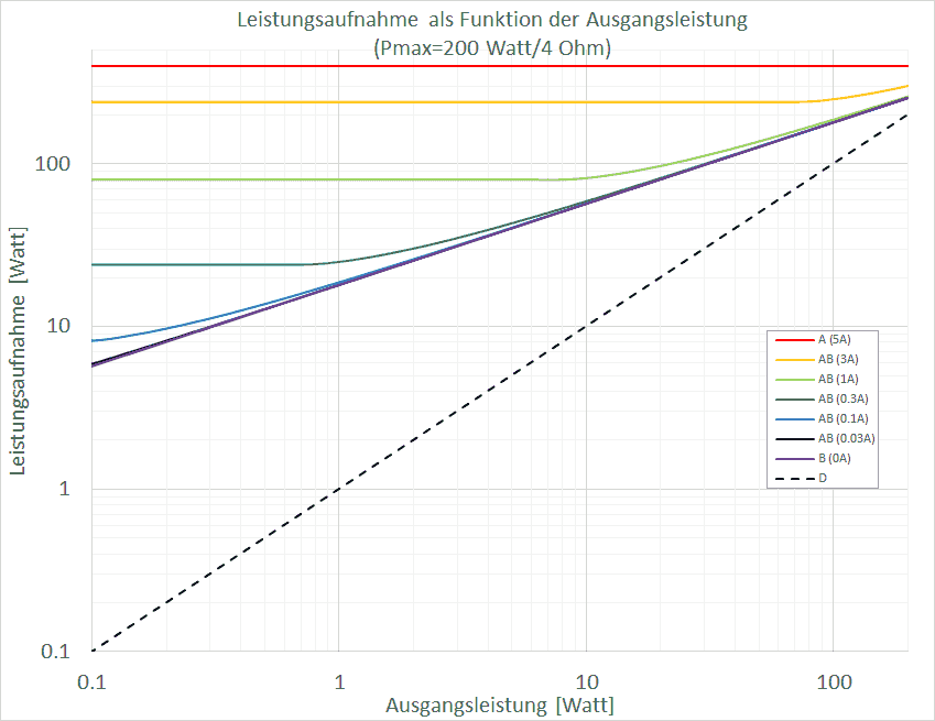 Leistungsaufnahme eines 200 Watt/4-Ohm-Verstärkers in Abhängigkeit von der Ausgangsleistung und dem Verstärkerprinzip